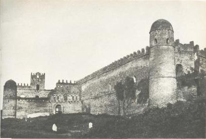 Bakafa Hall